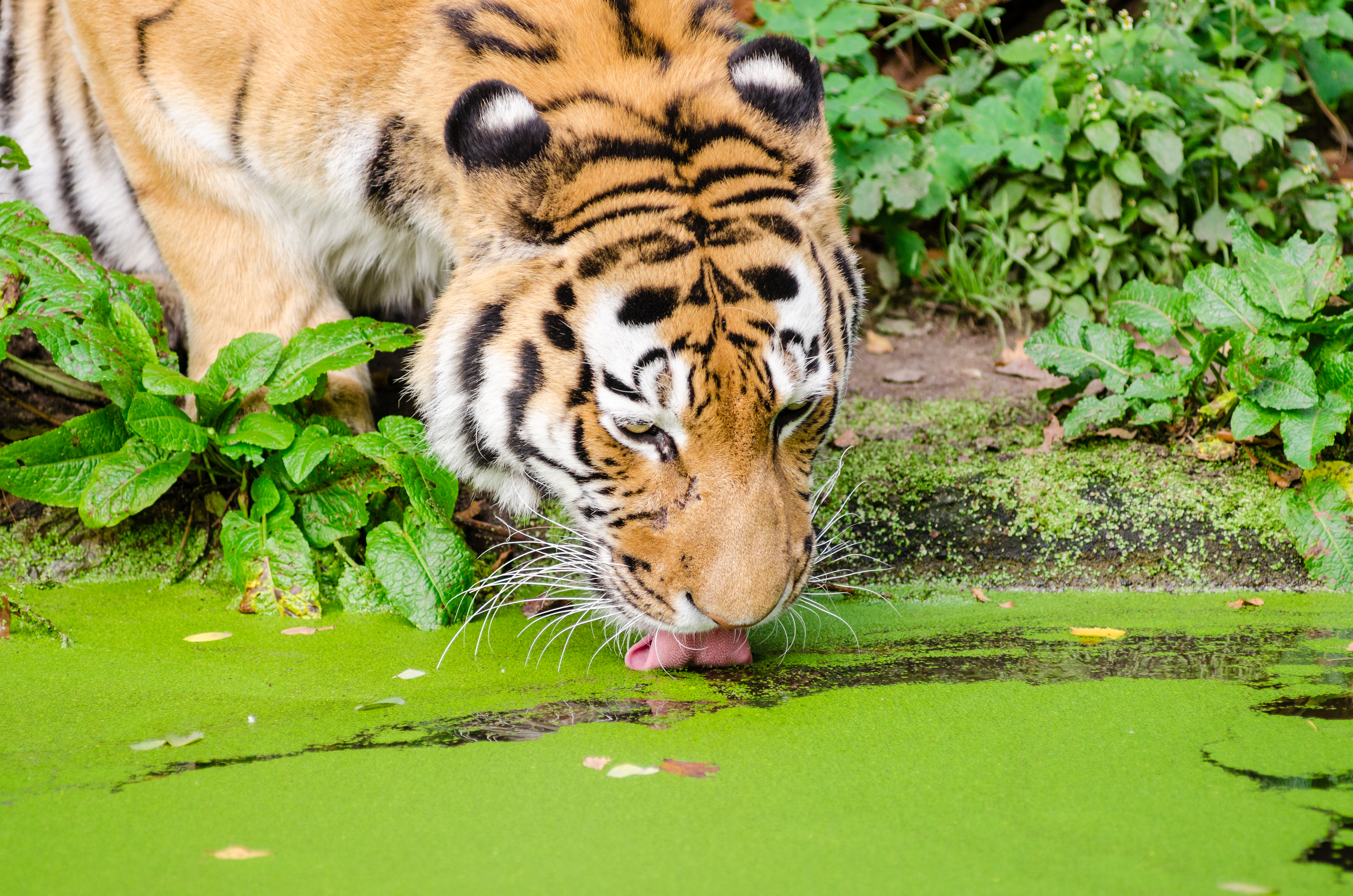 Tiger